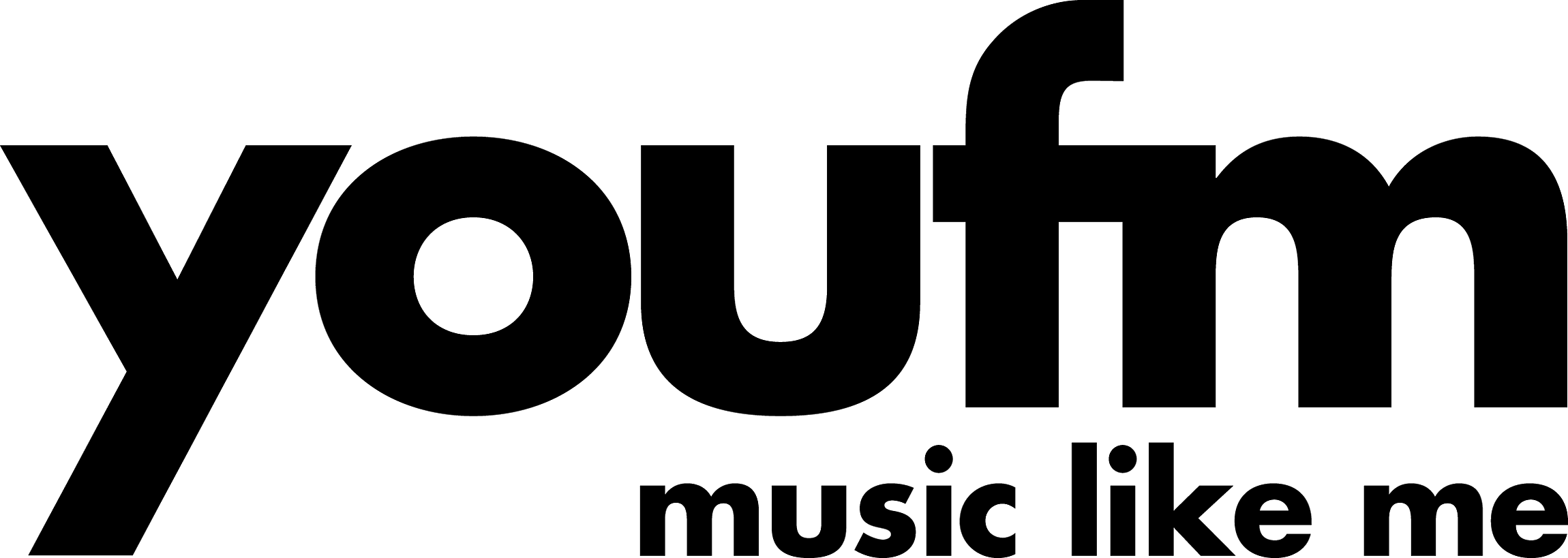 Logo des Radiosenders YOU FM